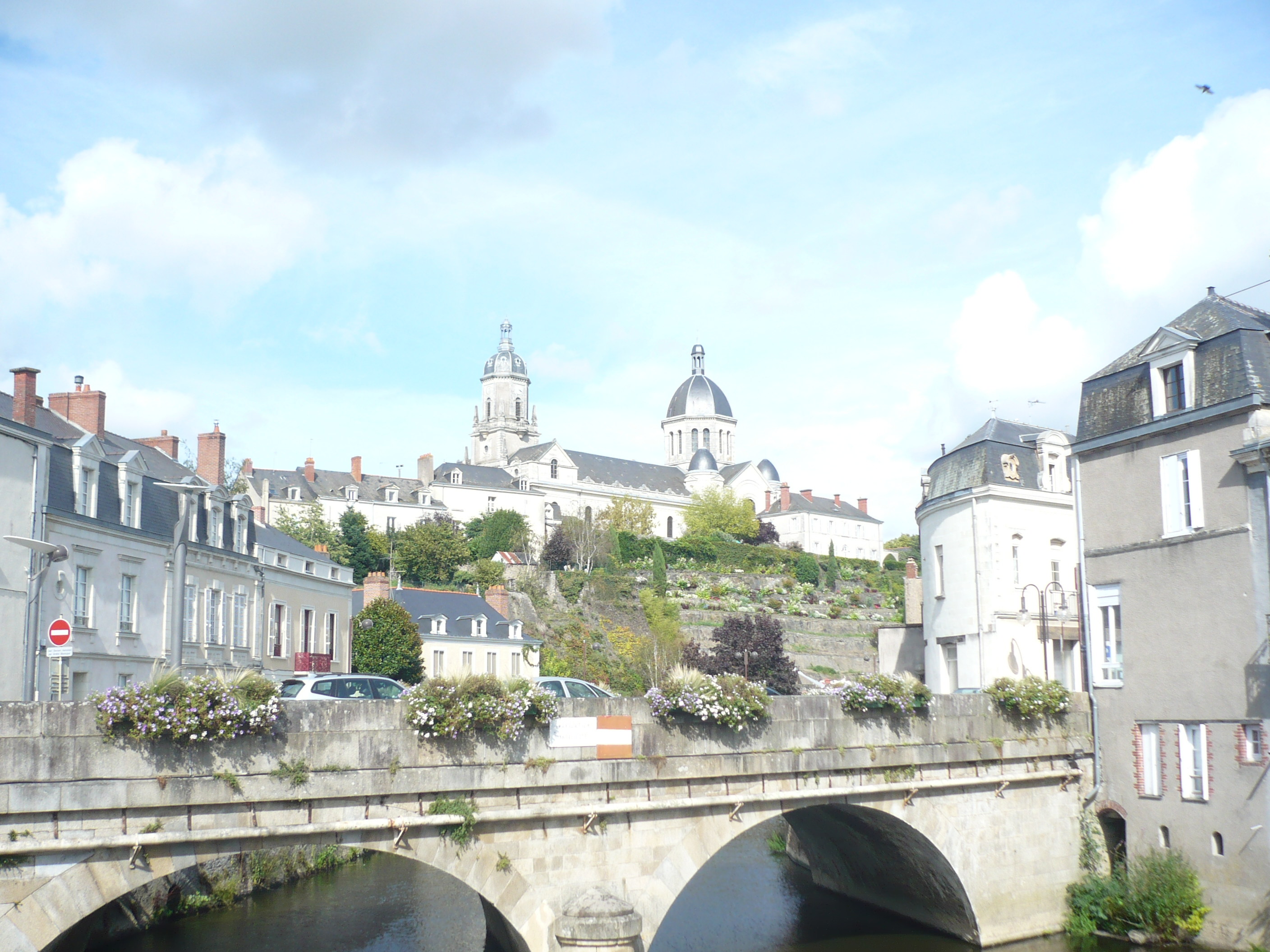 Segré - Eglise .